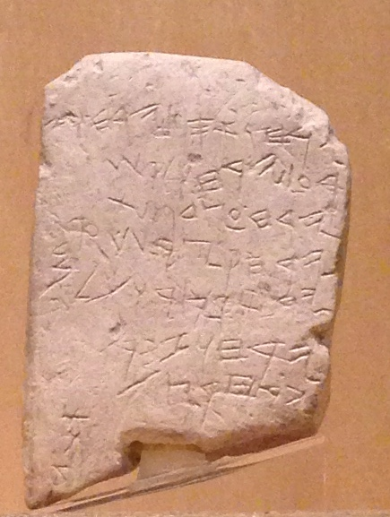 Gezer calendar clos